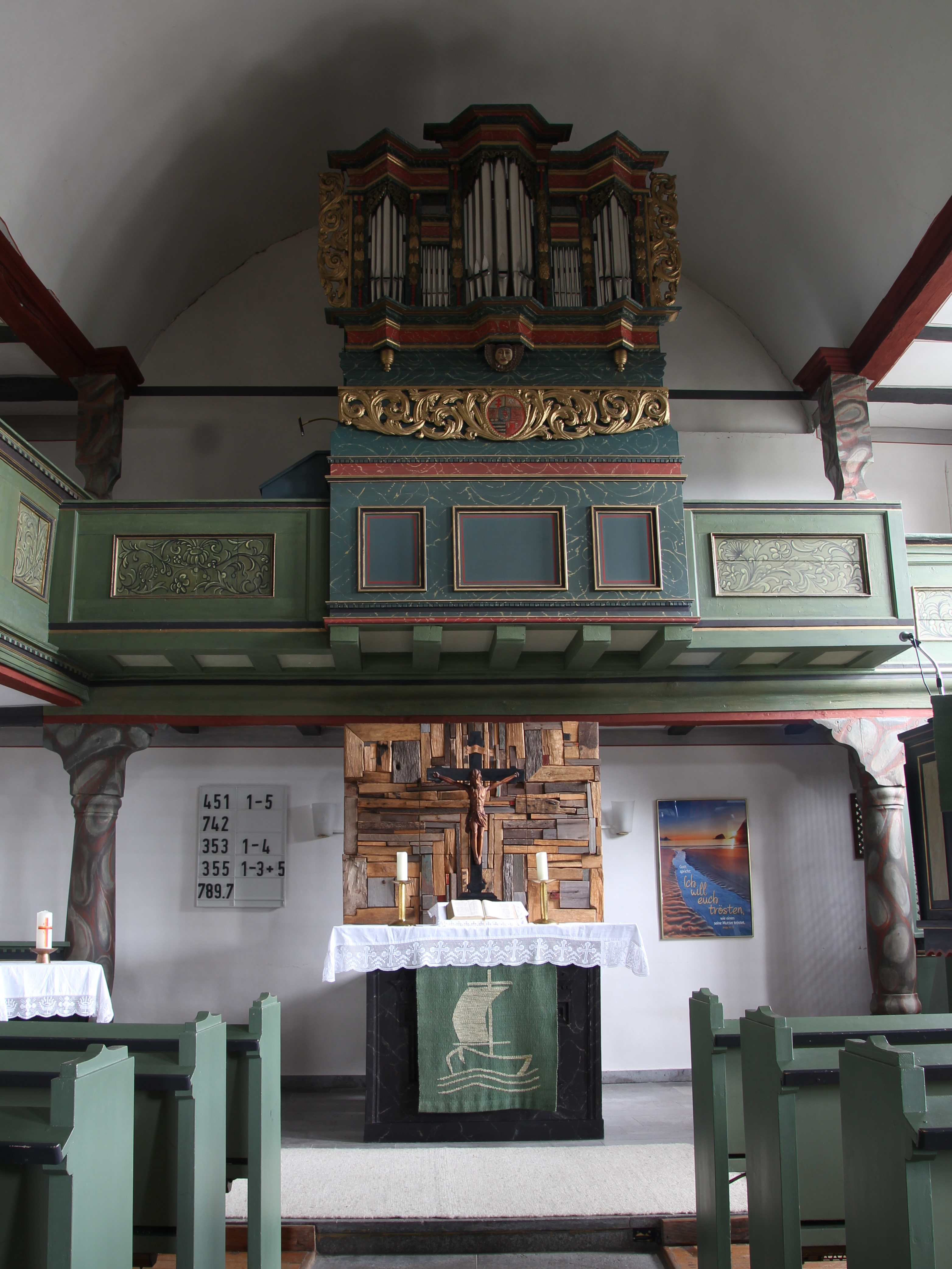 Kirche